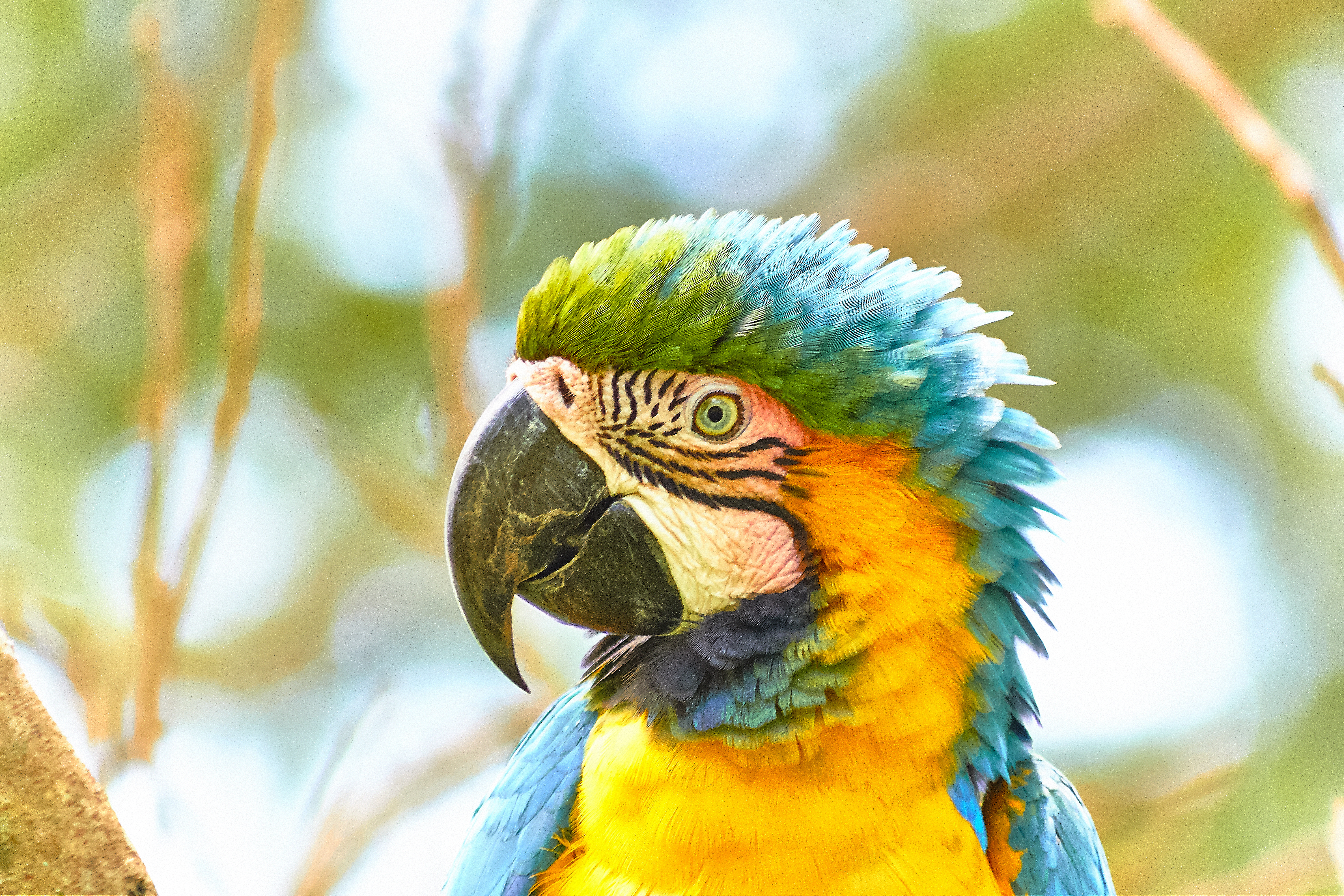 El guacamayo azulamarillo (Ara ararauna),2 también conocido como guacamayo azul y amarillo, papagayo amarillo o paraba azul amarillo,3 es una especie de ave psittaciforme de la familia de los loros endémica de América del Sur. Su área de distribución comprende desde Panamá hasta el norte de Paraguay y Bolivia,1 pasando por toda la cuenca amazónica. En cautividad se reproducen fácilmente; en libertad viven en grupos de 25-30 ejemplares. Este loro es el representante inconfundible de los guacamayos, loros con poderosos picos y colas muy largas.